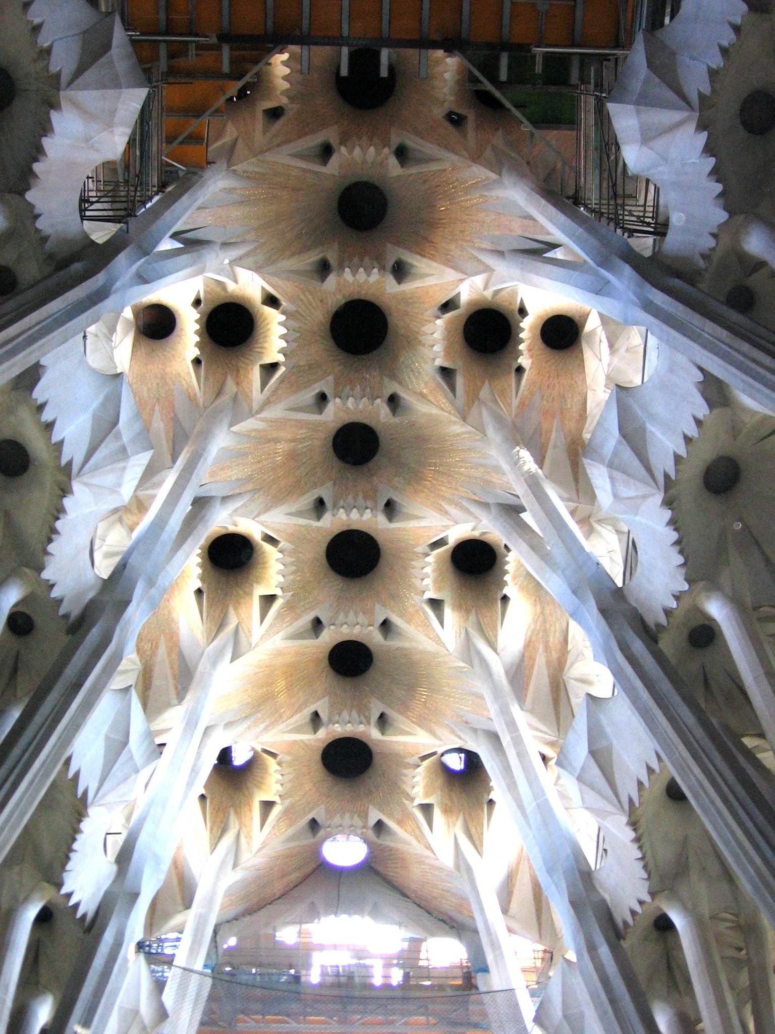 Bóveda de la Sagrada Familia.